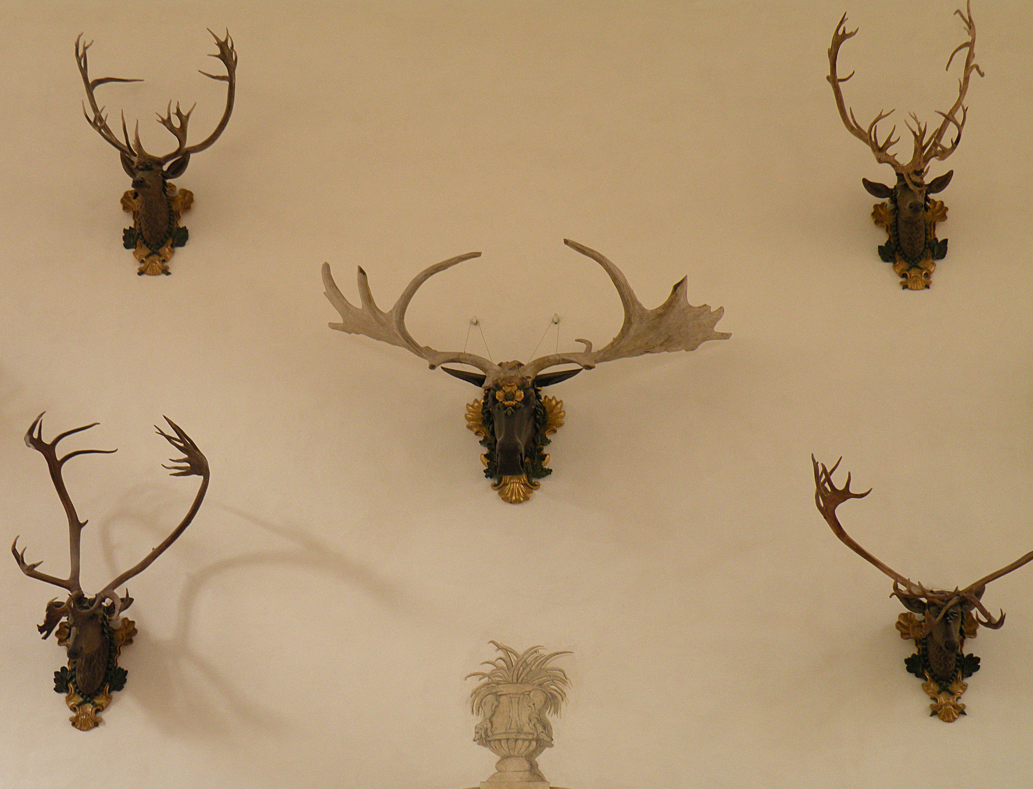 Коллекция_рогов замка Морицбург.В центре рога Гигантского оленя (лат. Megaloceros) или большерогого оленя - подарок Петра Великого Августу Сильному.